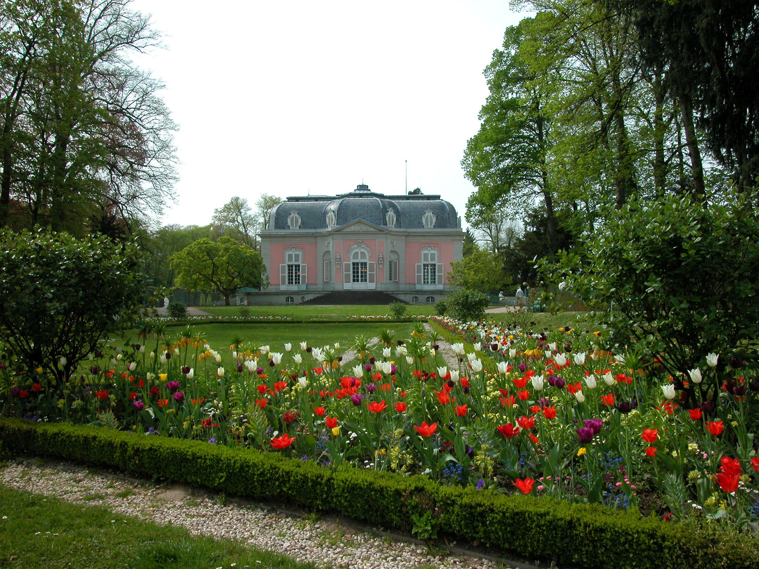 Schloess Benrath, Duesseldorf (Дворец и парк «Бенрат» в Дюссельдорфе)